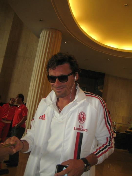 Stefano Nava sebagai pemain AC Milan Glorie di Jakarta awal September 2011